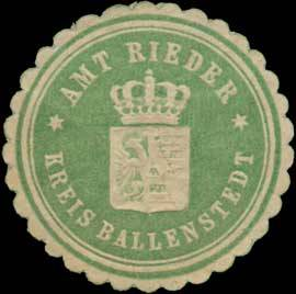 Sealing stamp Title: Amt Rieder Kreis Ballenstedt Description: grün, weiß, geprägt Place: Rieder size: 3 cm